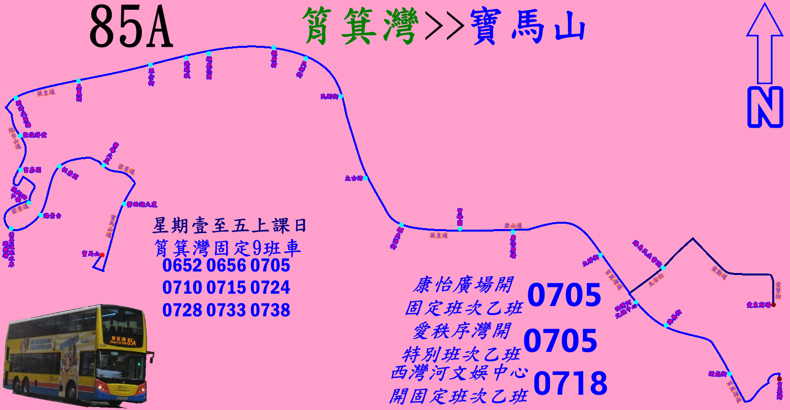 中文（香港）: 城巴85A線(寶馬山方向)的走線圖